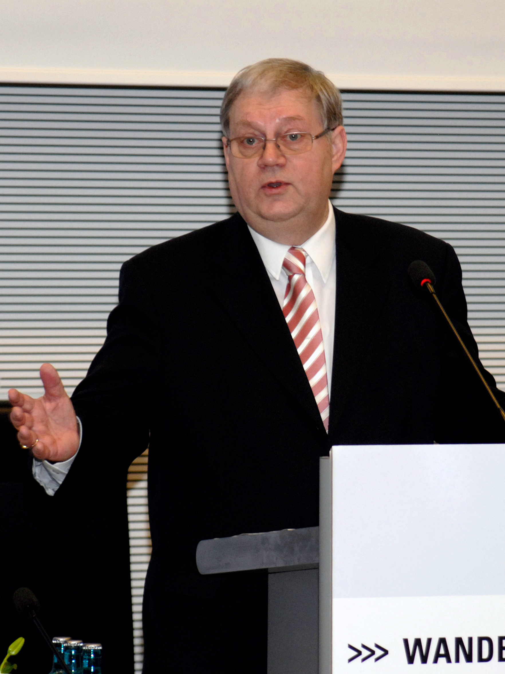 Jochen-Konrad Fromme, Vorsitzender der Gruppe der Vertriebenen, Flüchtlinge und Aussiedler der CDU/CSU-Bundestagsfraktion